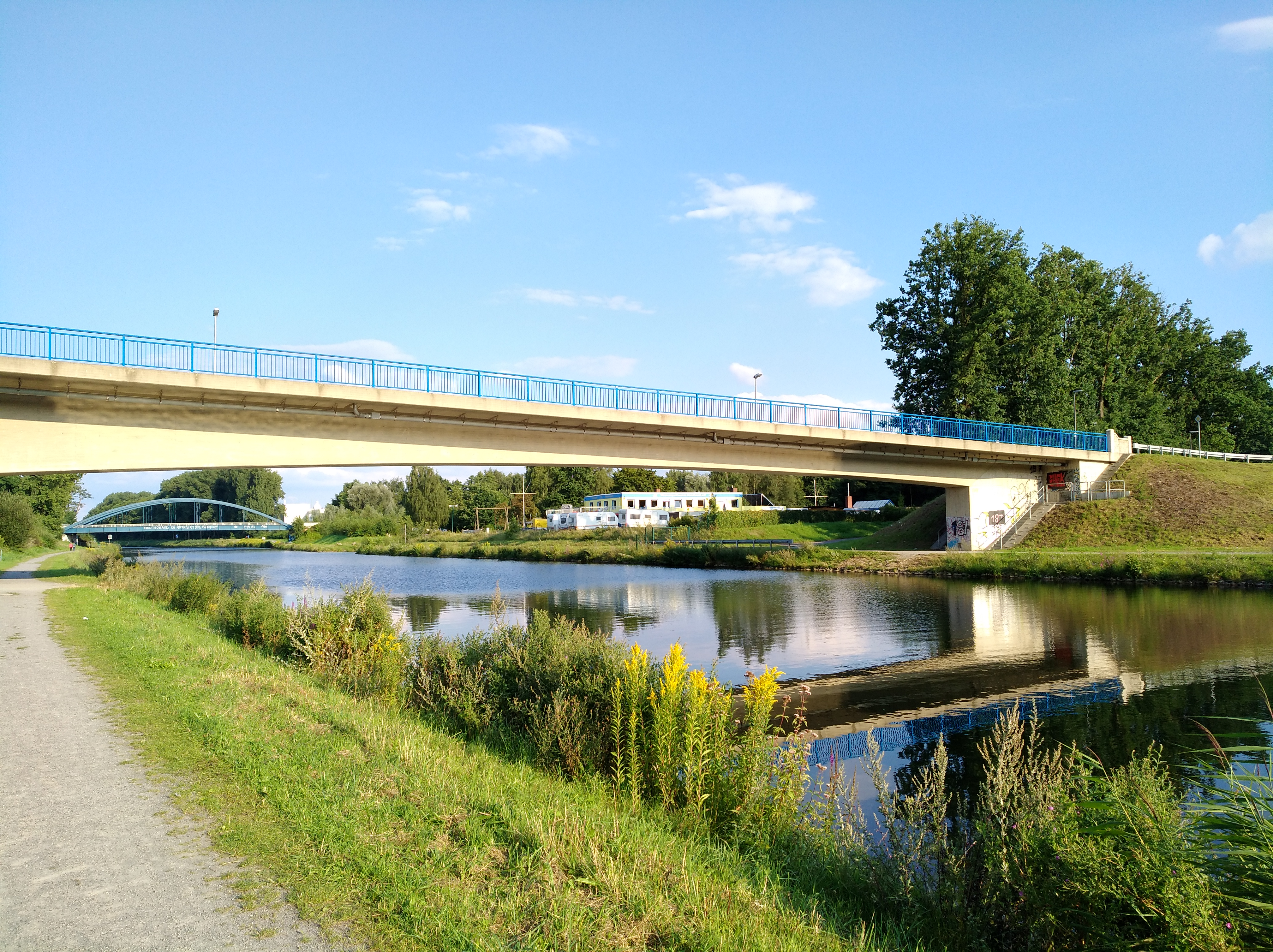 Die Straßenbrücke "Die Eversburg" über den Stichkanal Osnabrück, ungefähr bei Kanalkilometer 10,7, Blickrichtung Süd-Ost. Im Hintergrund die Straßenbrücke "Glückaufstraße" (links) und das Wassersportzentrum.